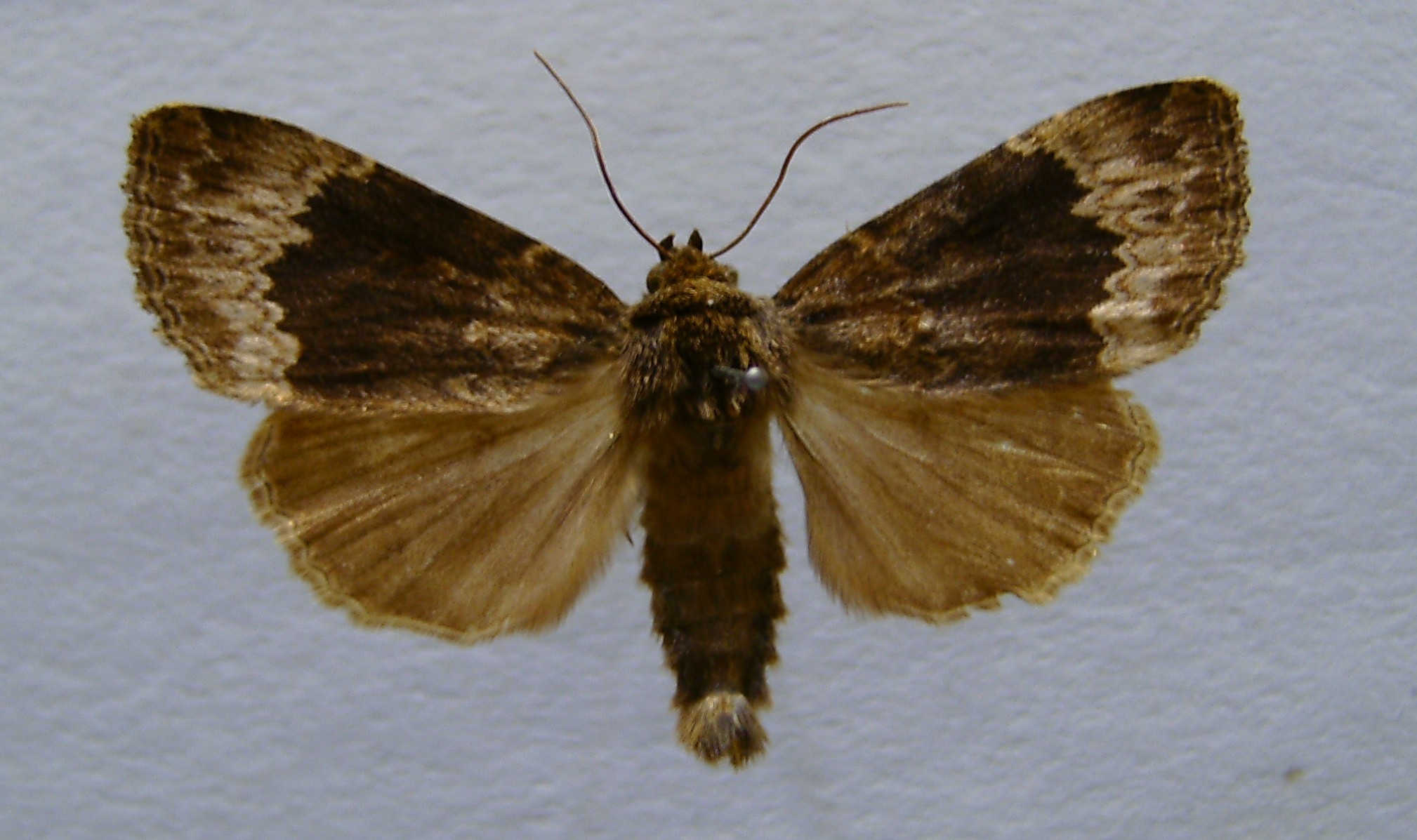 Amphipyra perflua, Golling